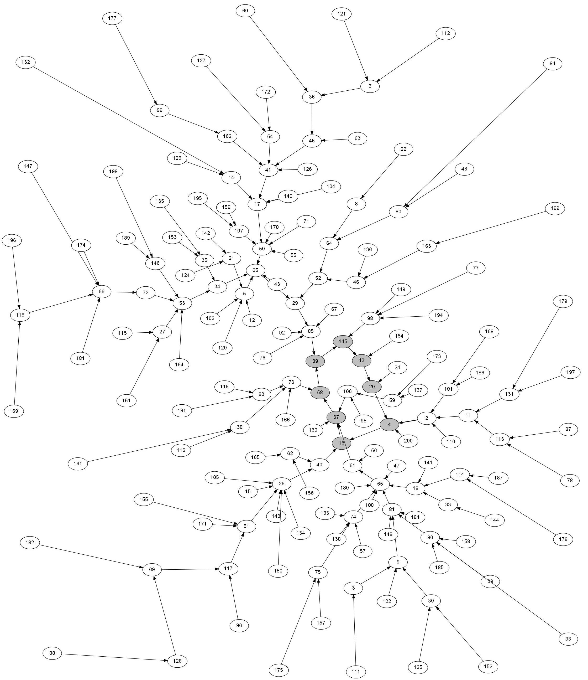 A 200-nál kisebb nem boldog számok gráffal ábrázolva. A gráf csomópontjai a számok, élei a transzformáció (számjegyek négyzetösszege) eredményét jelölik. A ciklikus elemek szürkével kiemelve